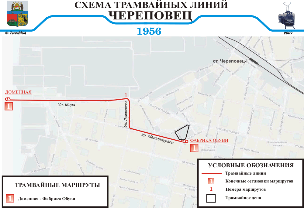 Схема трамвайных маршрутов Череповца 1956 г.